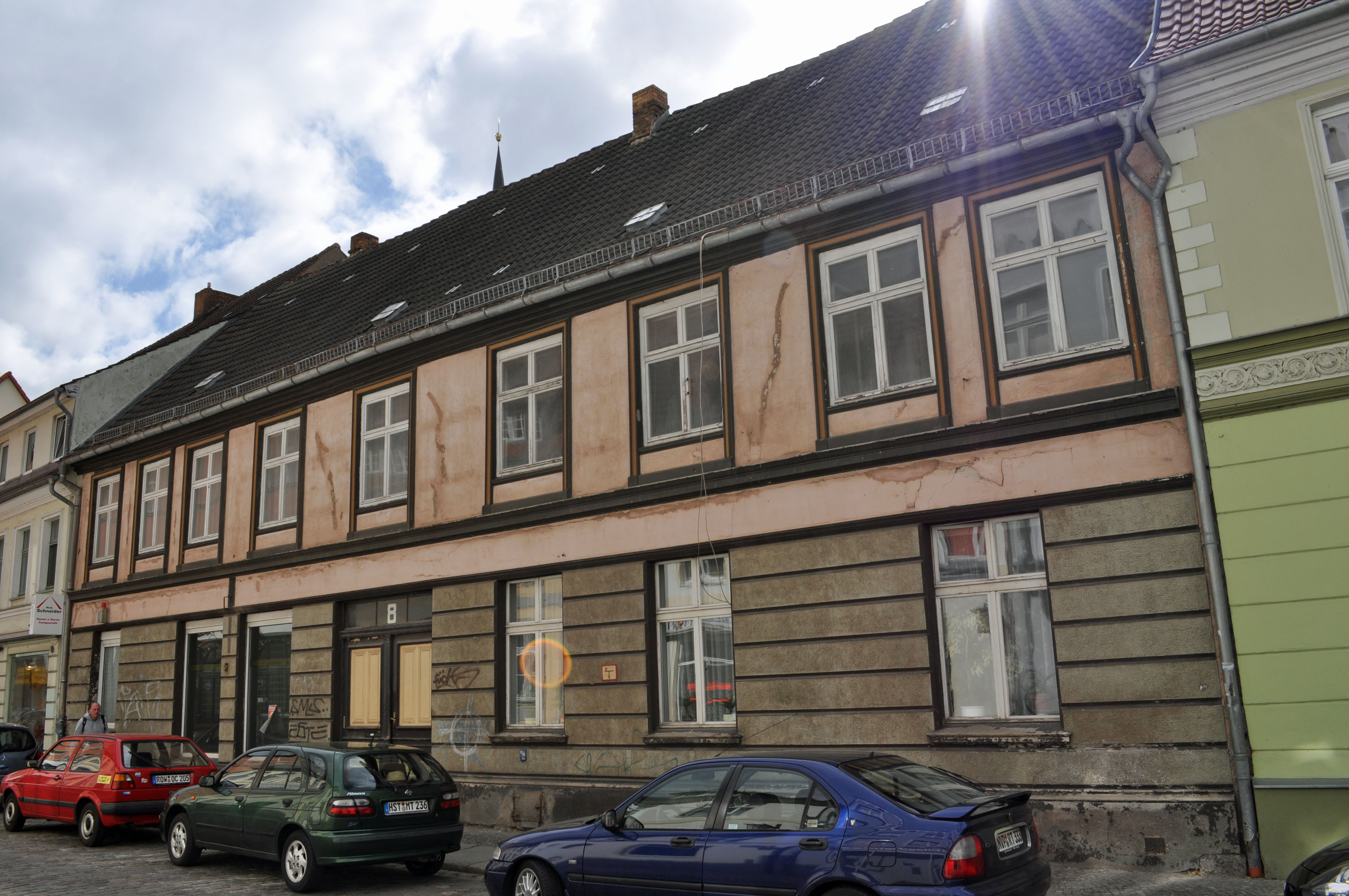 Gebäude in Stralsund, siehe Dateiname